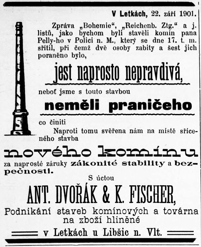 tovární komíny, stavební firmy, inzeráty, fabriky.cz, továrny, Fischer, Letky, Dvořák